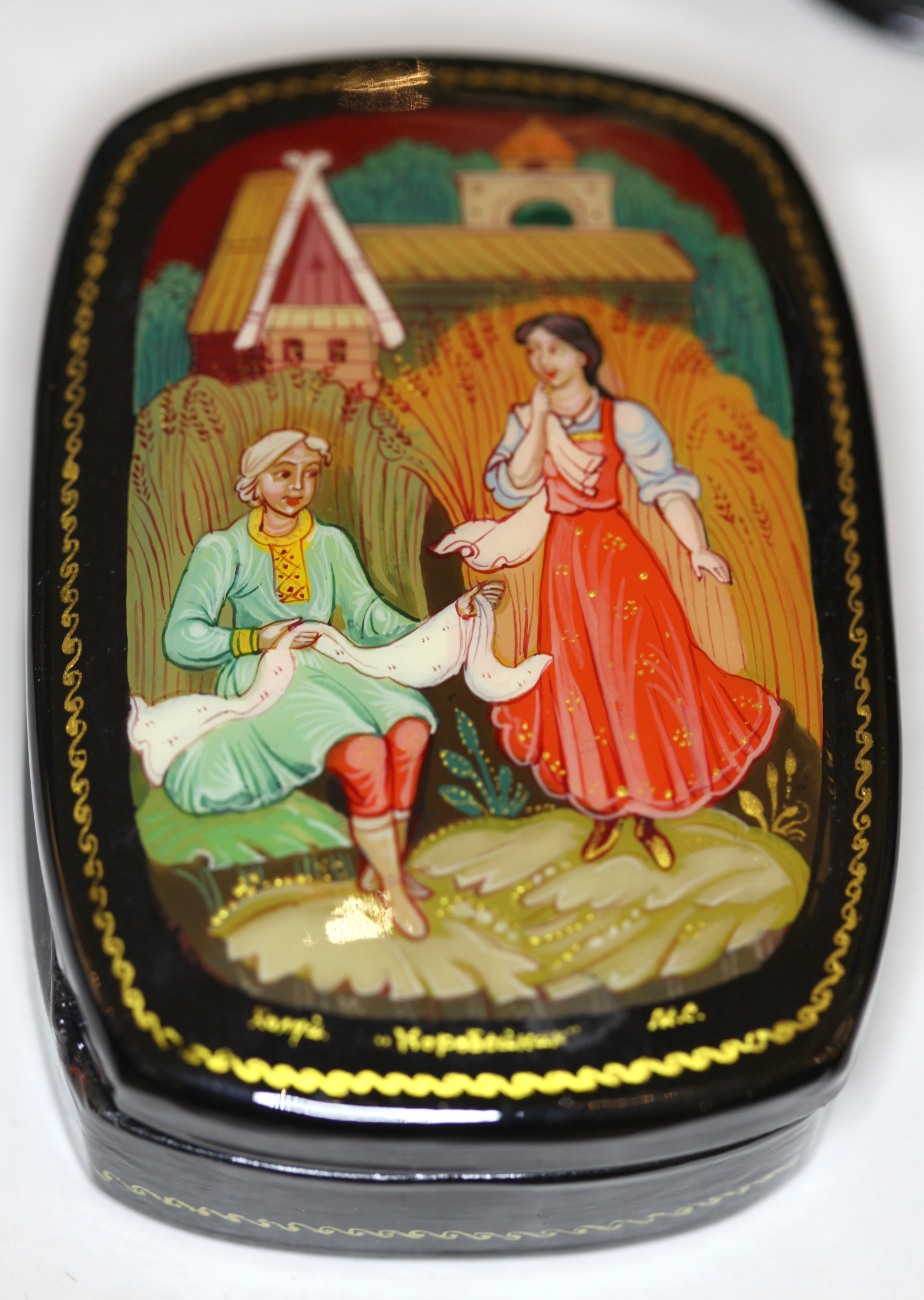 Russische Lackkunst: Lackminiaturen aus Feodoskiono, Mstjora, Palech und Cholui (freundlicherweise für Fotos zur Verfügung gestellt vom Souvenirgeschäft "Kalinka" in Köln, Unter Taschenmacher 10